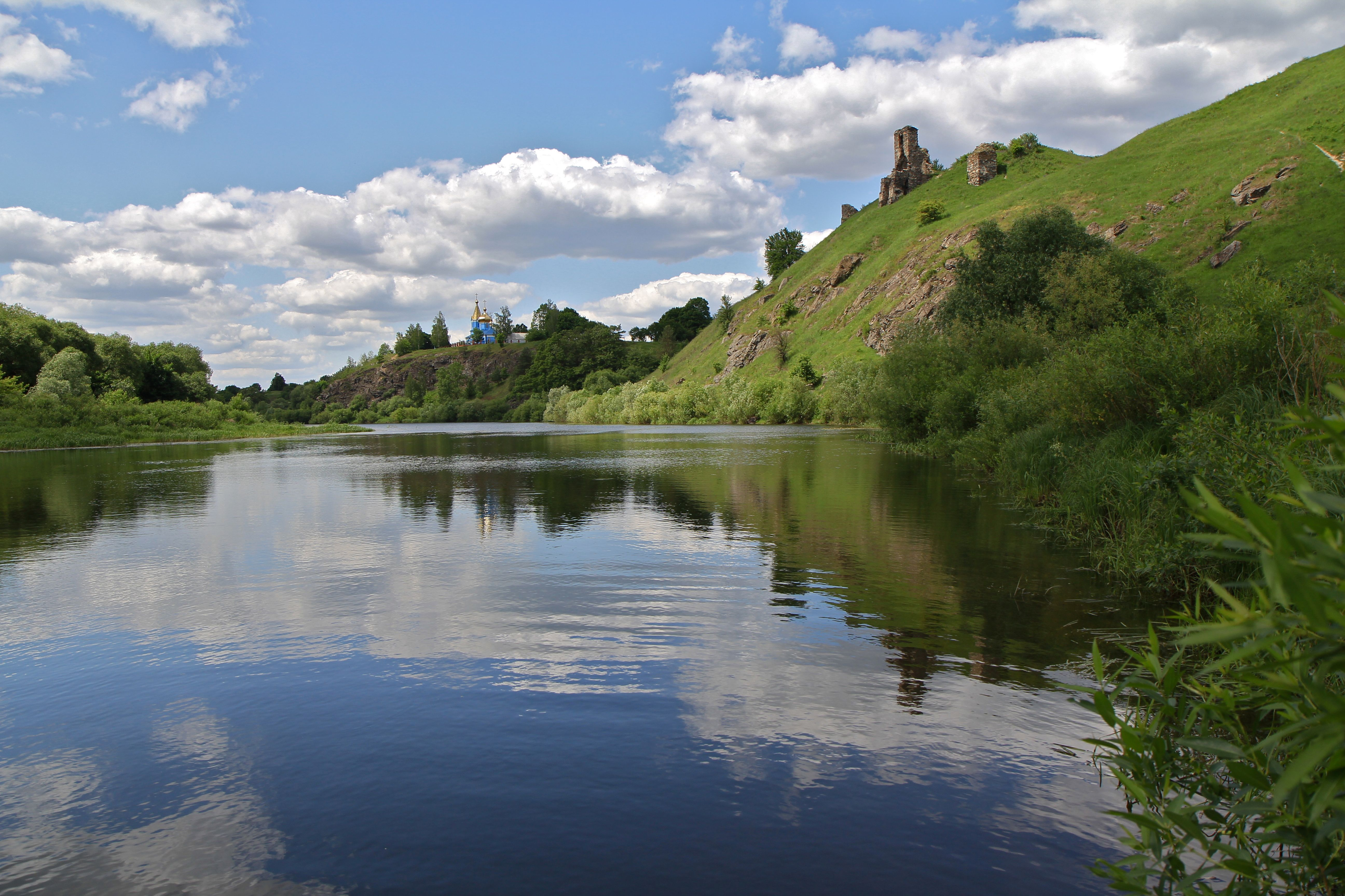 Губків і Случ